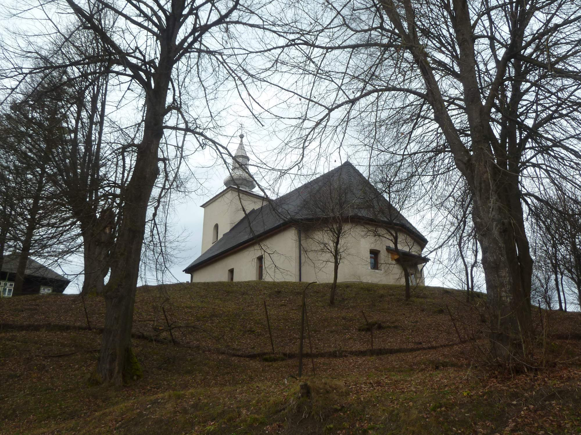 Starina, kostolík.